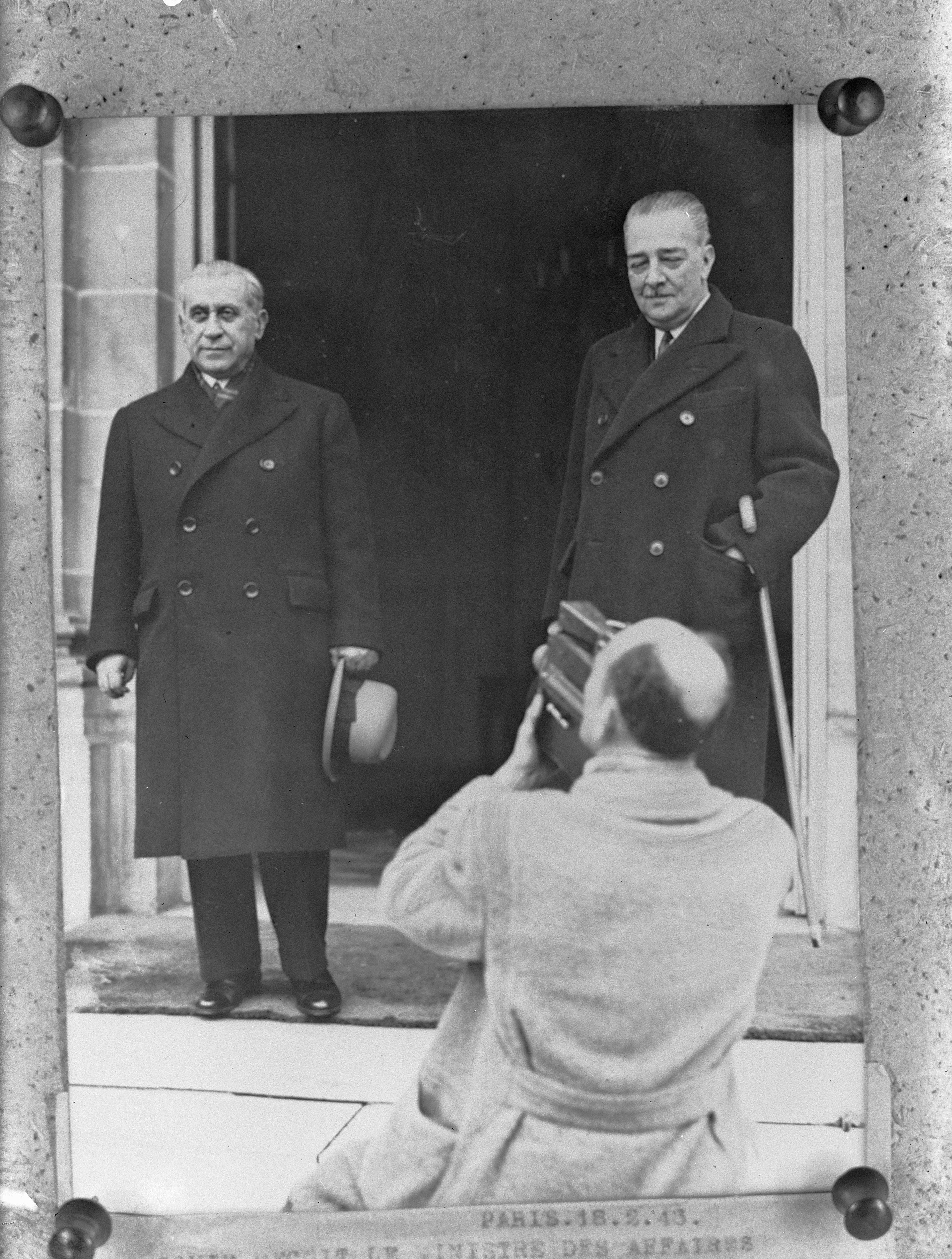 Collectie / Archief : Fotocollectie Anefo Reportage / Serie : [ onbekend ] Beschrijving : Turkse minister van Buitenlandse Zaken Numan Menemencioglu (met wandelstok) Datum : 5 maart 1946 Locatie : Turkije Trefwoorden : ministers , politiek Persoonsnaam : Menemencioglu, Numan Fotograaf : World Press Photo Auteursrechthebbende : Nationaal Archief Materiaalsoort : Glasnegatief Nummer archiefinventaris : bekijk toegang 2.24.01.09 Bestanddeelnummer : 901-5475